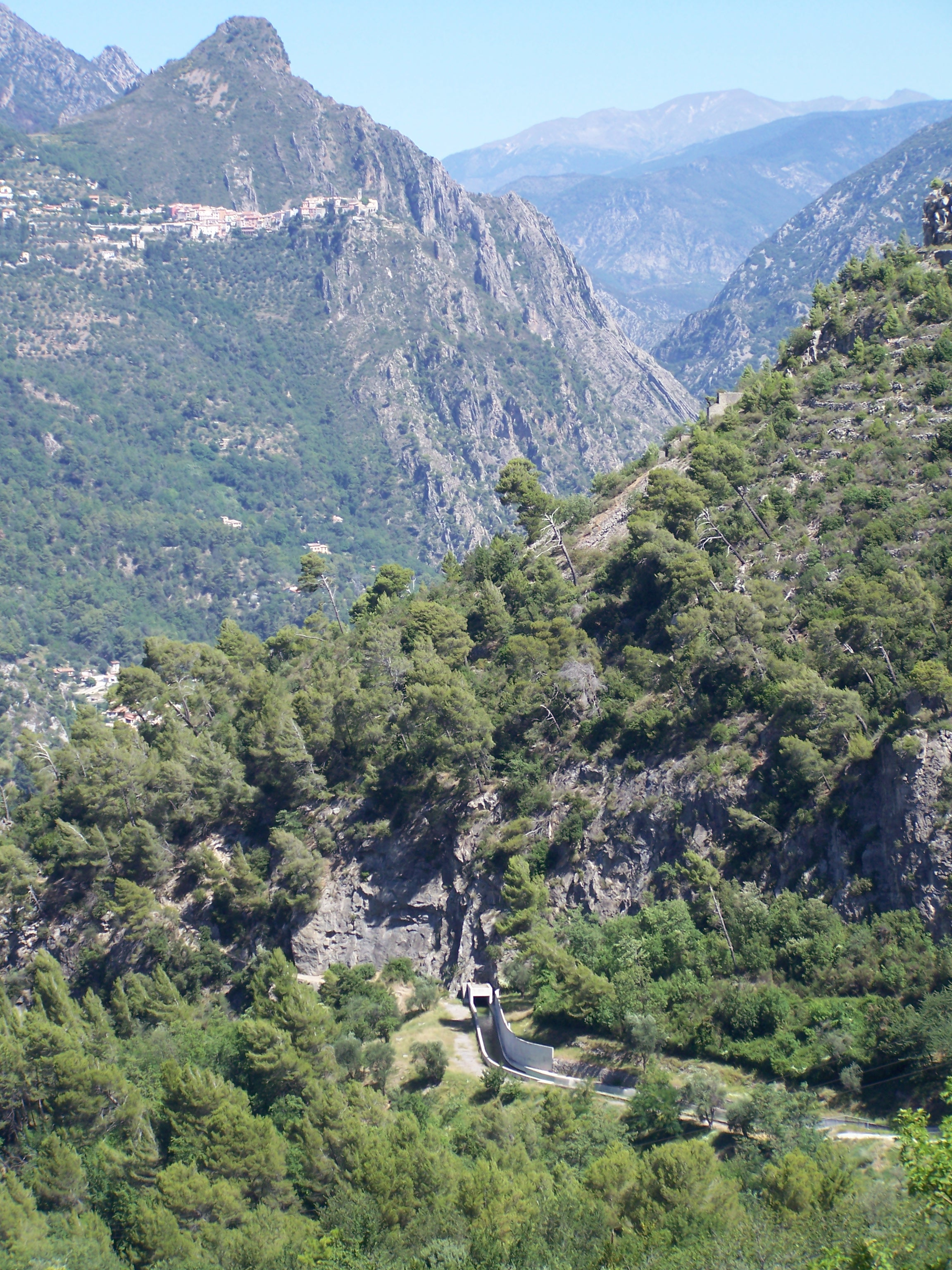 "Canal de la Vésubie" sur la commune de la Roquette sur Var (Alpes-Maritimes, France), construit en 1880 pour amener à Nice l'eau de la Vésubie à partie de Saint Jean la Rivière. Le village sur le promontoire est Bonson.